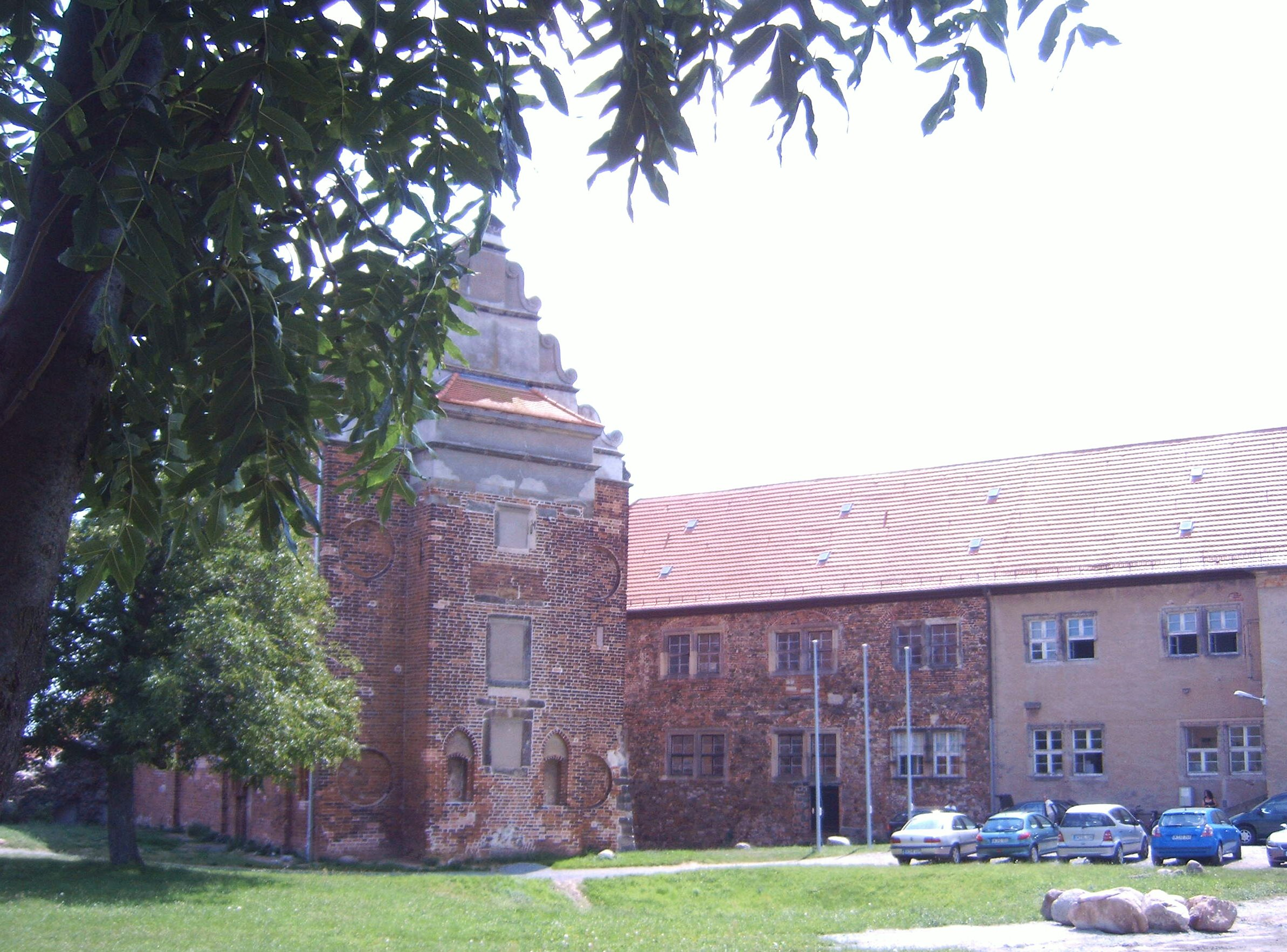 Palas des Schlosses Wolmirstedt, Sitz der Außenstelle Wolmirstedt des Amtsgerichtes Haldensleben, Sachsen-Anhalt